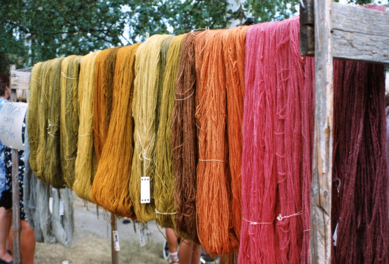 Gammelvala 1994